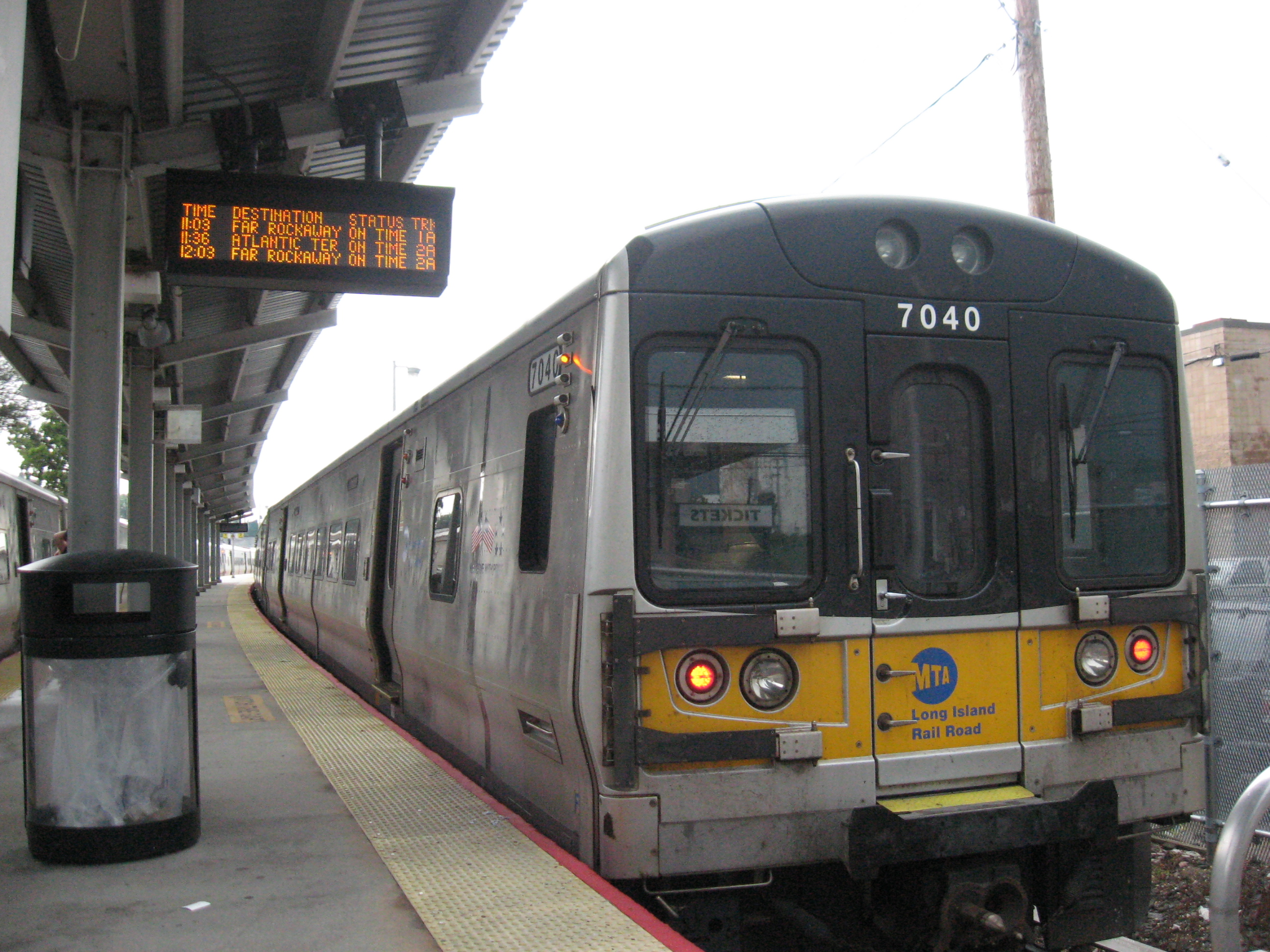 .....fun stuff....